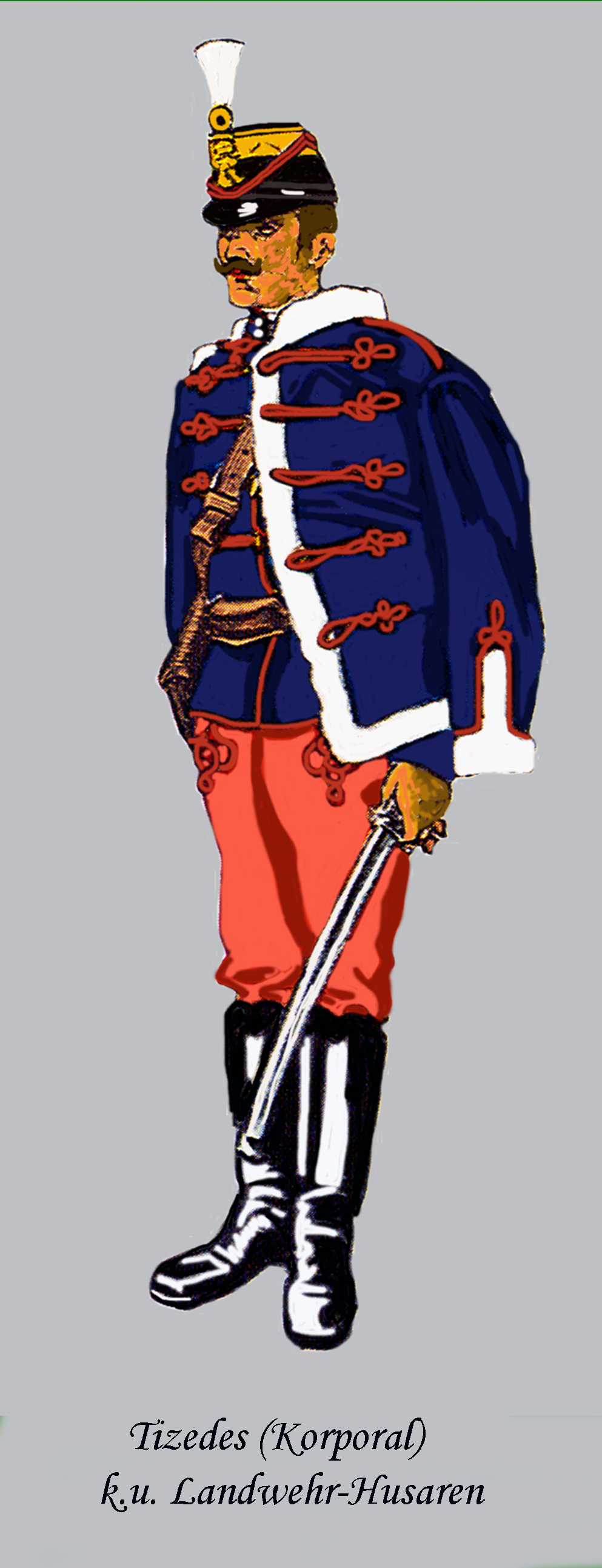 Husar der königlich-ungarischen Landwehr